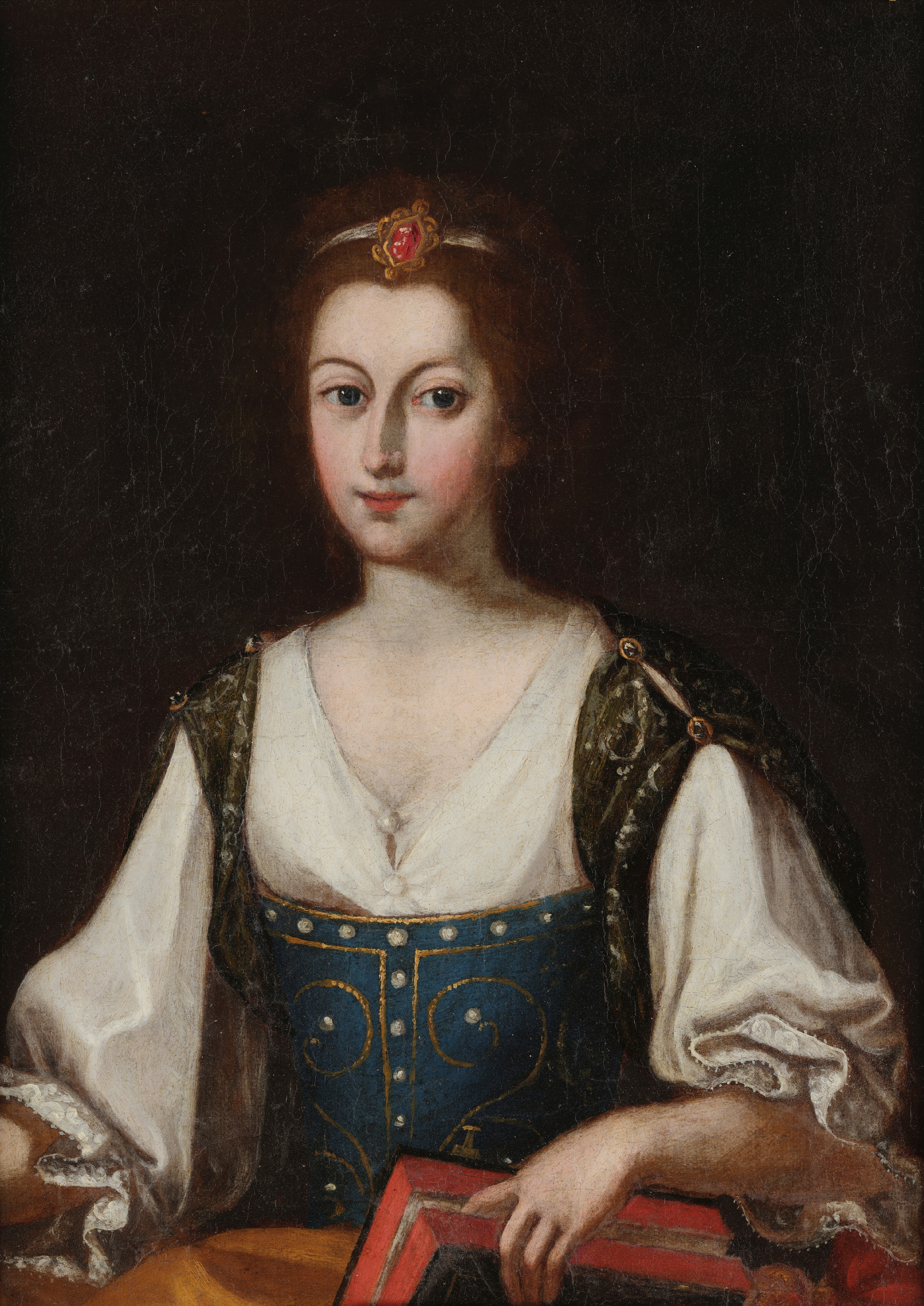 Isabel Luisa Josefa. óleo do Museu Nacional dos Coches, que esteve atribuído a Josefa de Óbidos